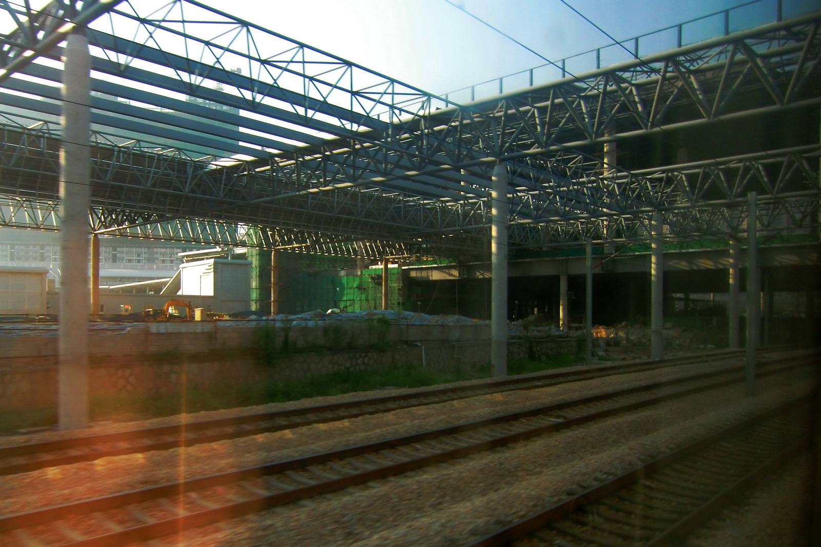 改造中的广深铁路布吉站